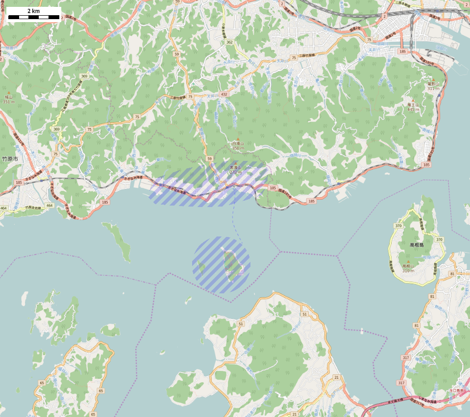 2015年の広島県竹原市忠海地区周辺 This map may be incomplete, and may contain errors. Don't rely solely on it for navigation.